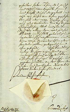 Ratificatio des Haubt Tractats", Urkunde der Ratifizierung des Krontraktats am 27.November 1700 durch Friedrich III., Kurfürst von Brandenburg.